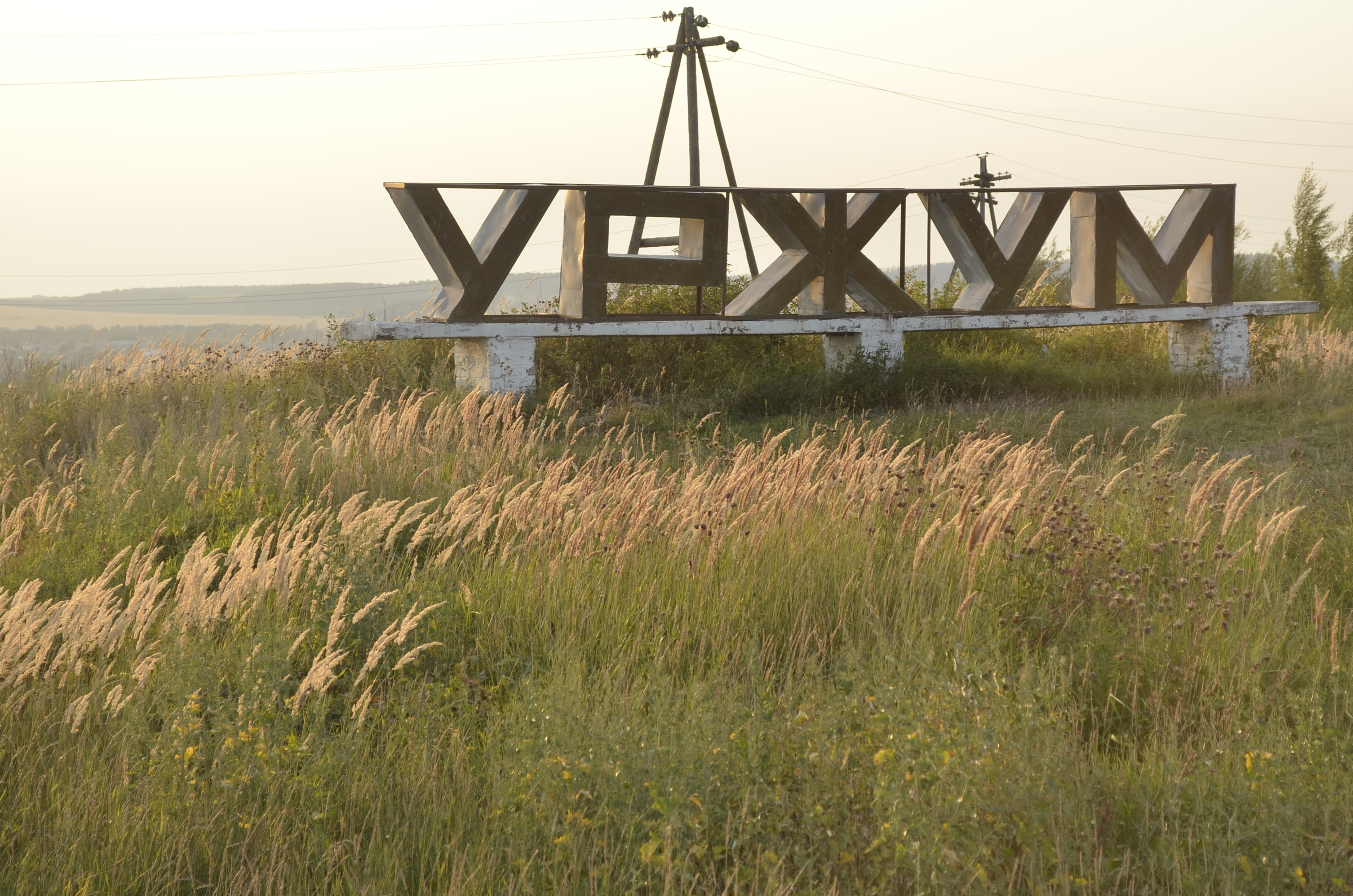 Знак на въезде в Уржум со стороны Малмыжа